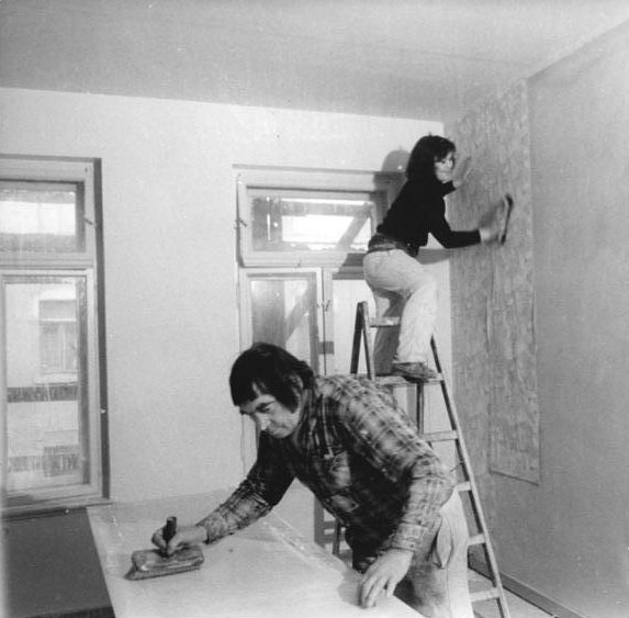 Leipzig, Bauarbeiter tapezierend ADN-ZB Gahlbeck 10.12.76 Leipzig: Zur 4. ZK Tagung-Komplexrenovierung im Leipziger Arbeiterwohnviertel Leutzsch- 15 modernisierte Wohnungen sollen bis Jahresende hier zusätzlich übergeben werden. Maler Paul Kermes und Ausbaufacharbeiter Andrea Schickram von der Malerbrigade Scholz des Kombinats für Baureparaturen haben diese Zielstellung fest im Griff. Die über 80 Jahre alten Häuser werden vom Keller bis zum Dach völlig aufpoliert. 700 Wohnung erhalten so bis 1979 Neubaukomfort. (vergl. dazu R 1210-4+5N) In der gesamten Republik verbesserten sich von Januar bis November 1976 für rund 396.000 (396.000) Bürger die Wohnbedingungen.